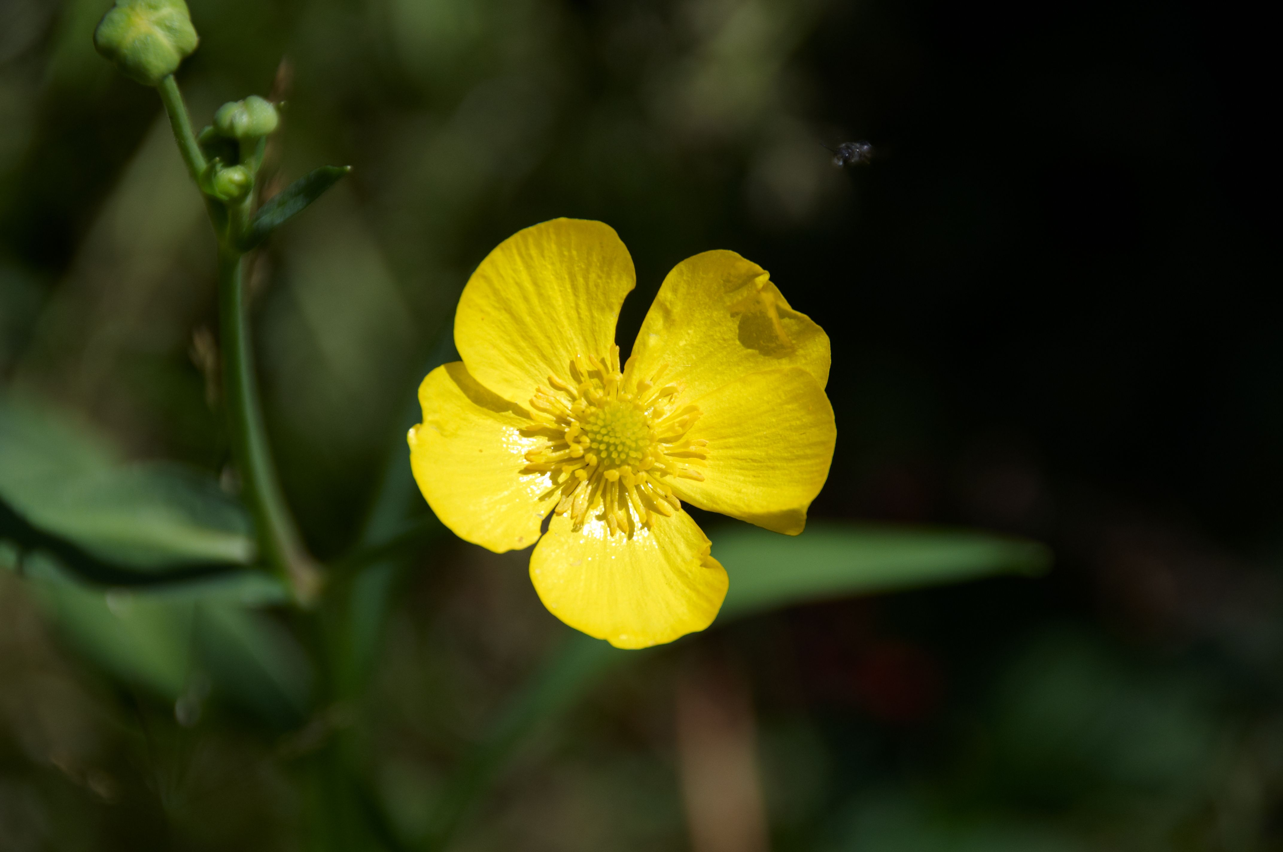 Grote boterbloem (Ranunculus lingua). Plant gekocht in tuincentrum in België